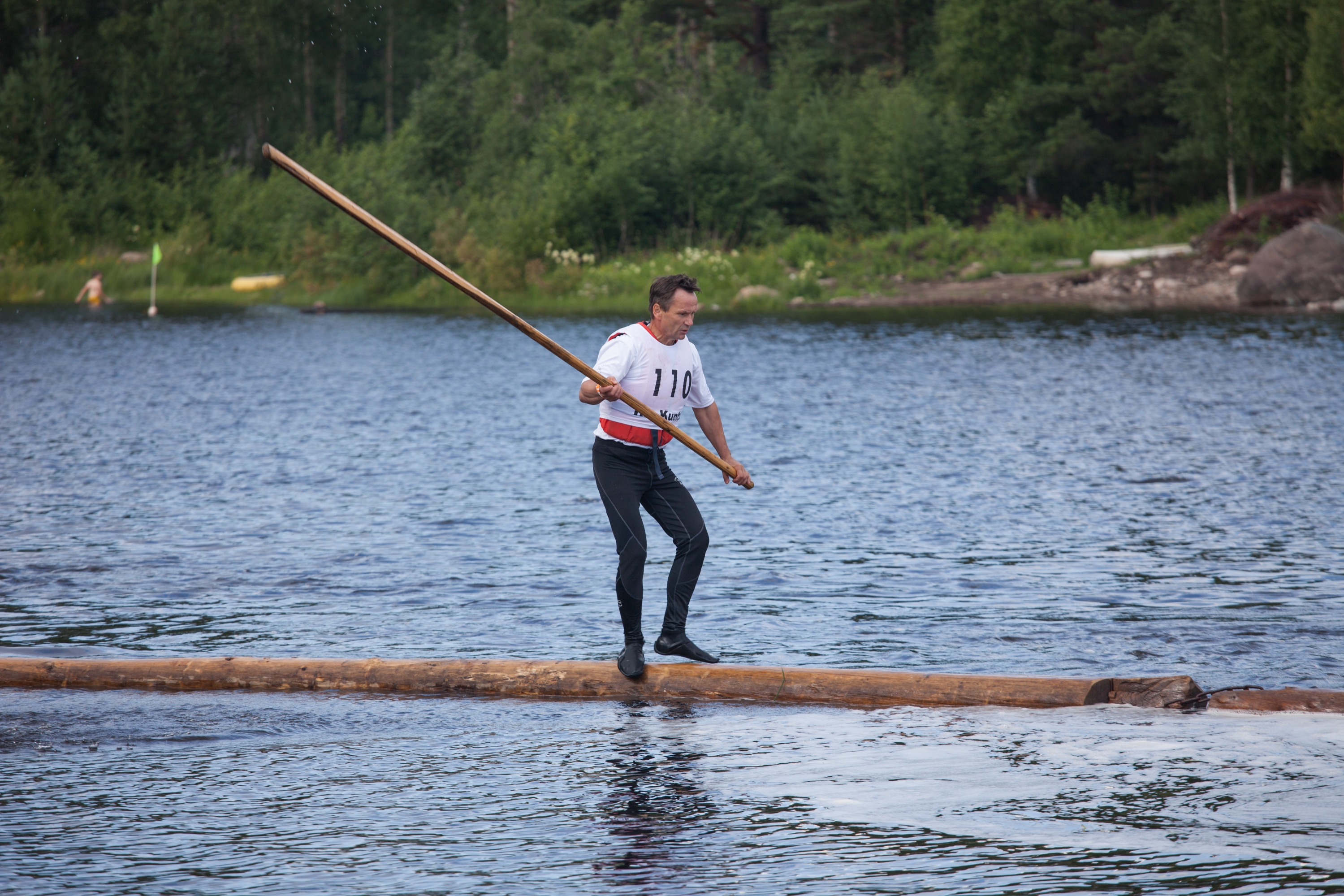 Puomillajuoksu Iin tukkilaiskisoissa